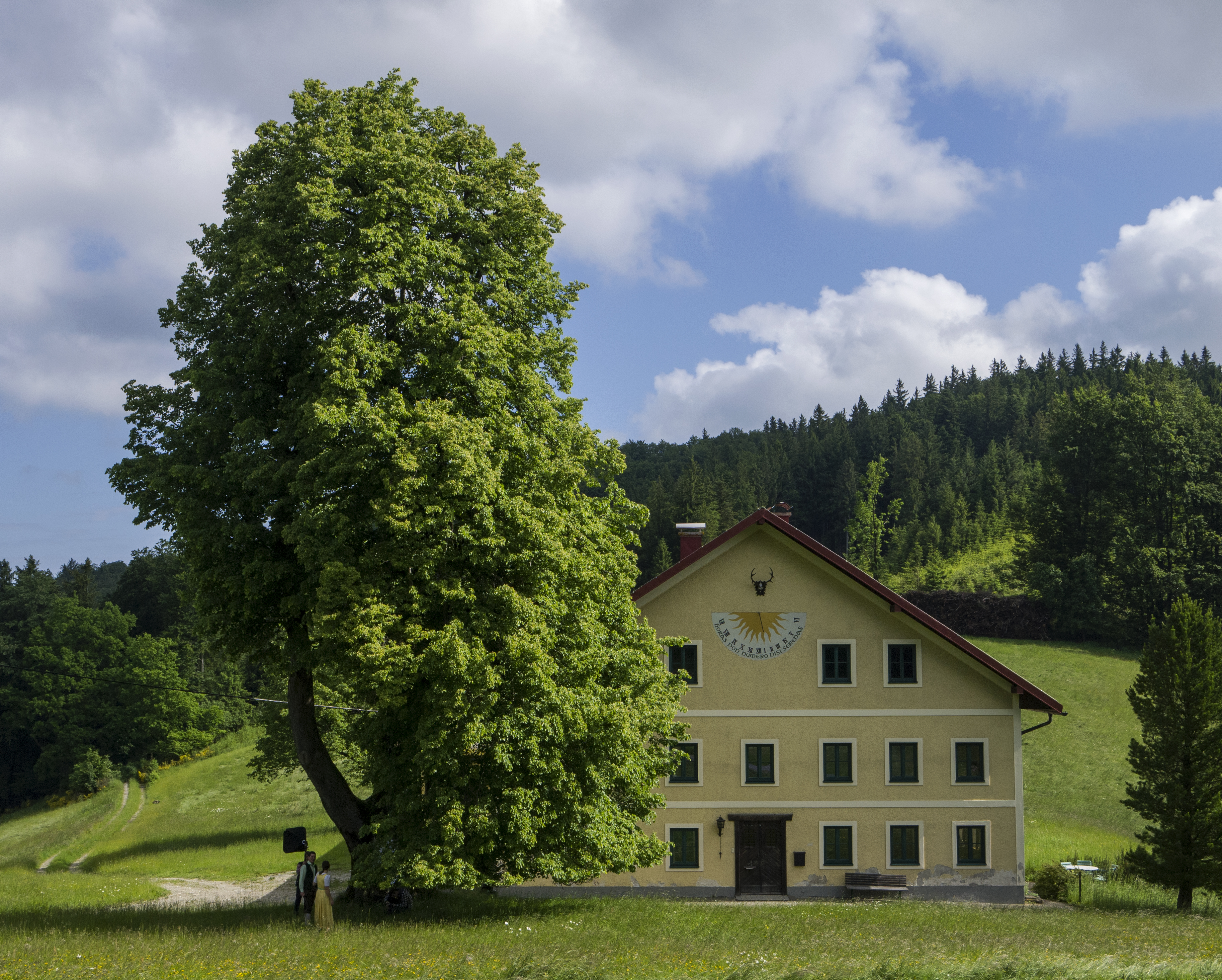 Linde beim Gasthaus Hochlehen This media shows the natural monument in Upper Austria with the ID nd045.